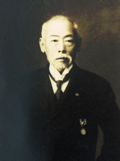 明治時代の教育者、野々山直記